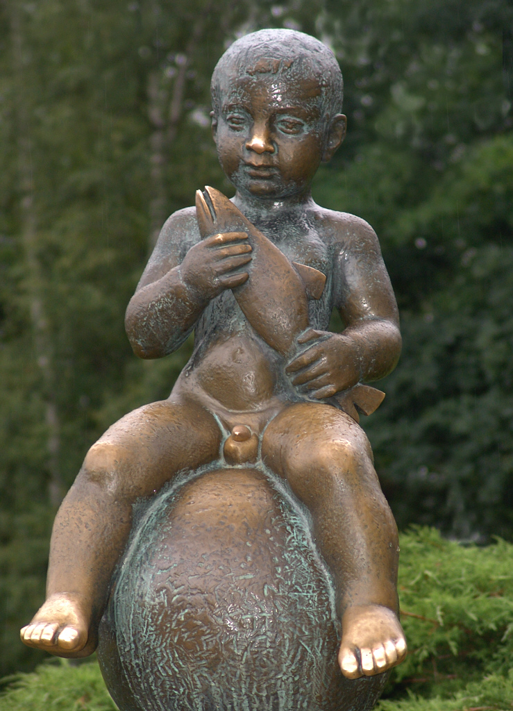 Die Statue des Franzel (František] in den Kuranlagen von Franzensbad (Františkovy Lázně). Er gilt als Symbol des Kurortes. Die Originalstatue von 1923 befindet sich im Städtischen Museum. (Foto von 2005).